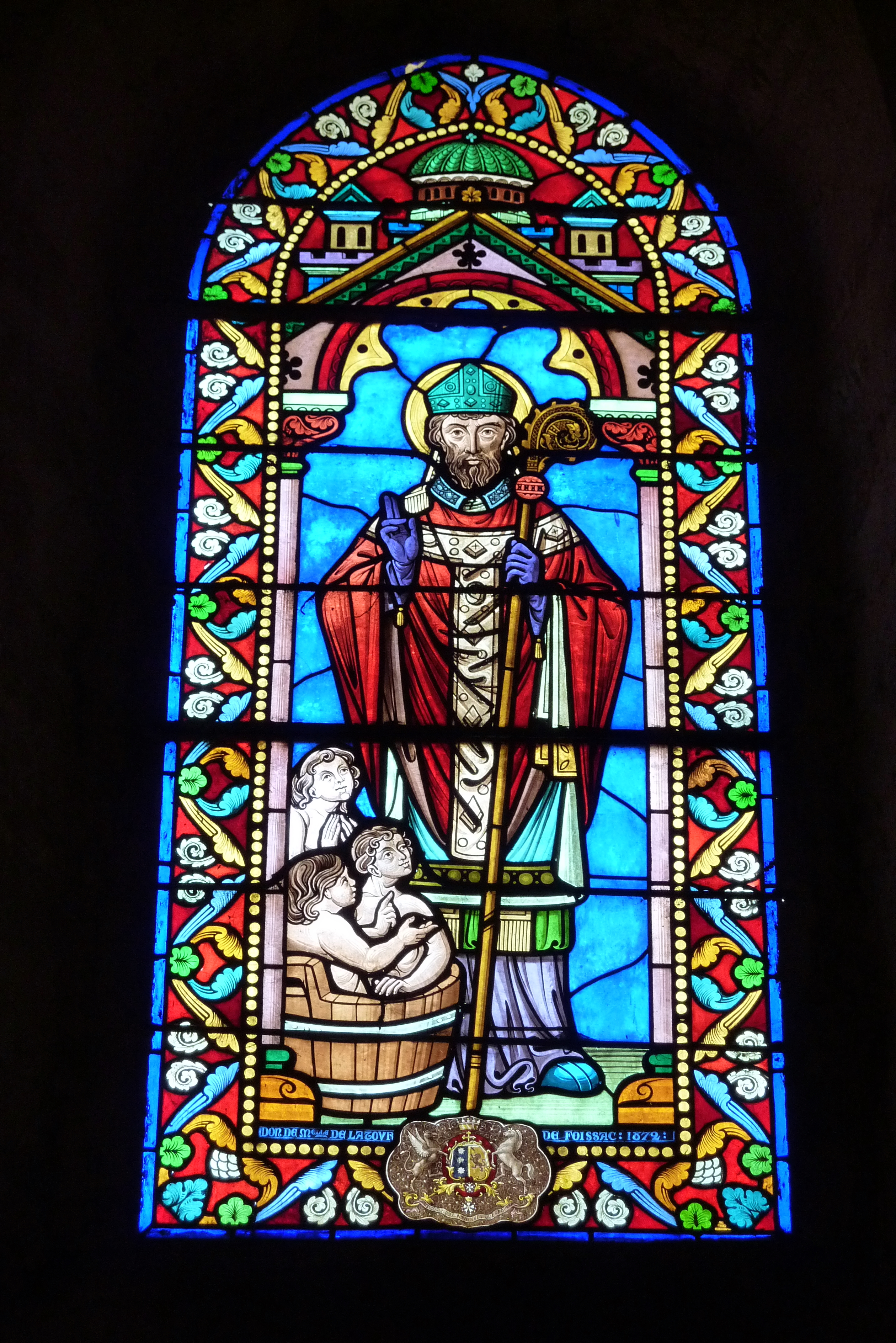 Bleiglasfenster in der Kirche Saint-Nicolas in Villennes-sur-Seine, Darstellung: hl. Nikolaus